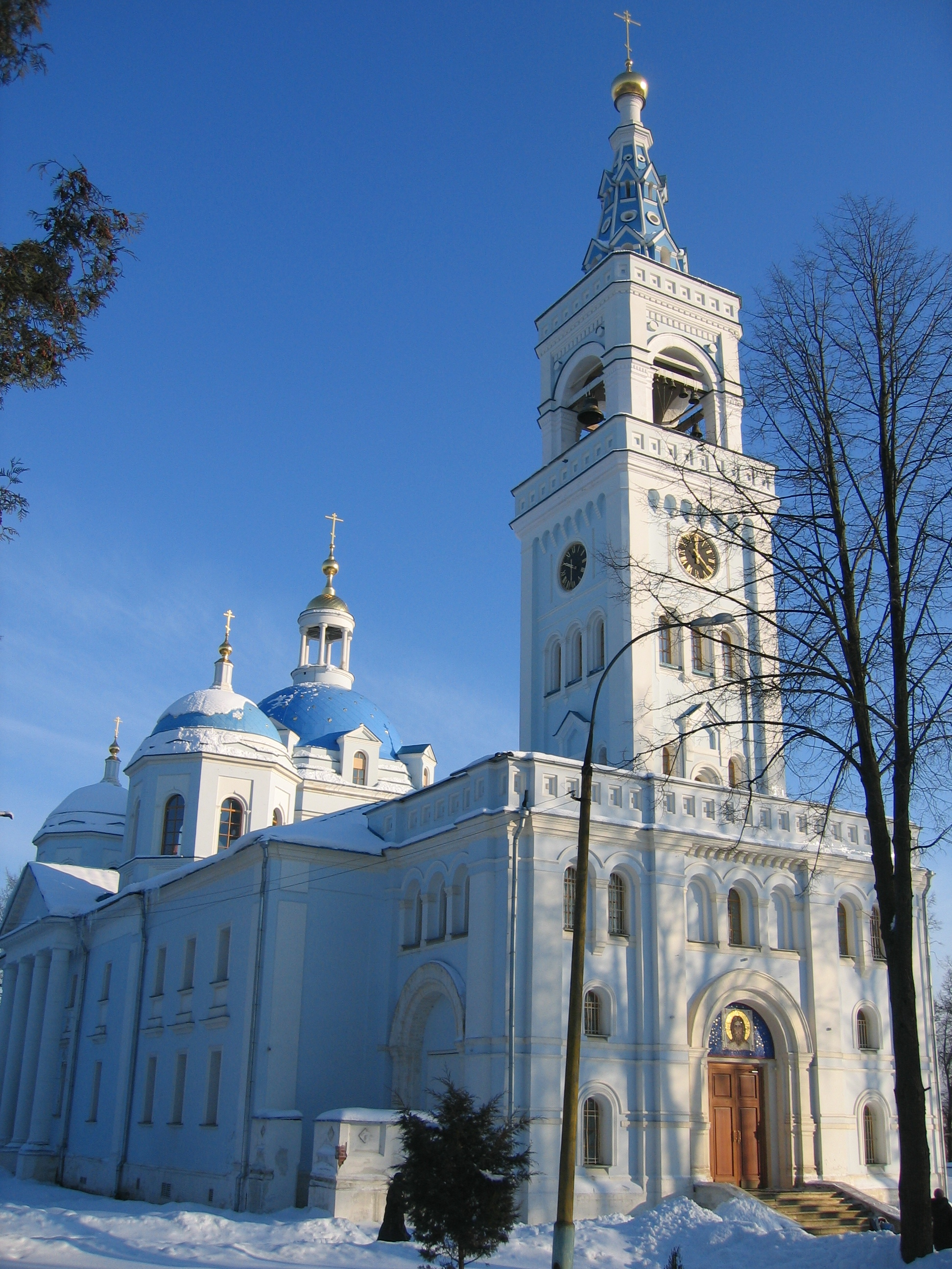 Спасо-Влахернский монастырь вблизи Яхромы